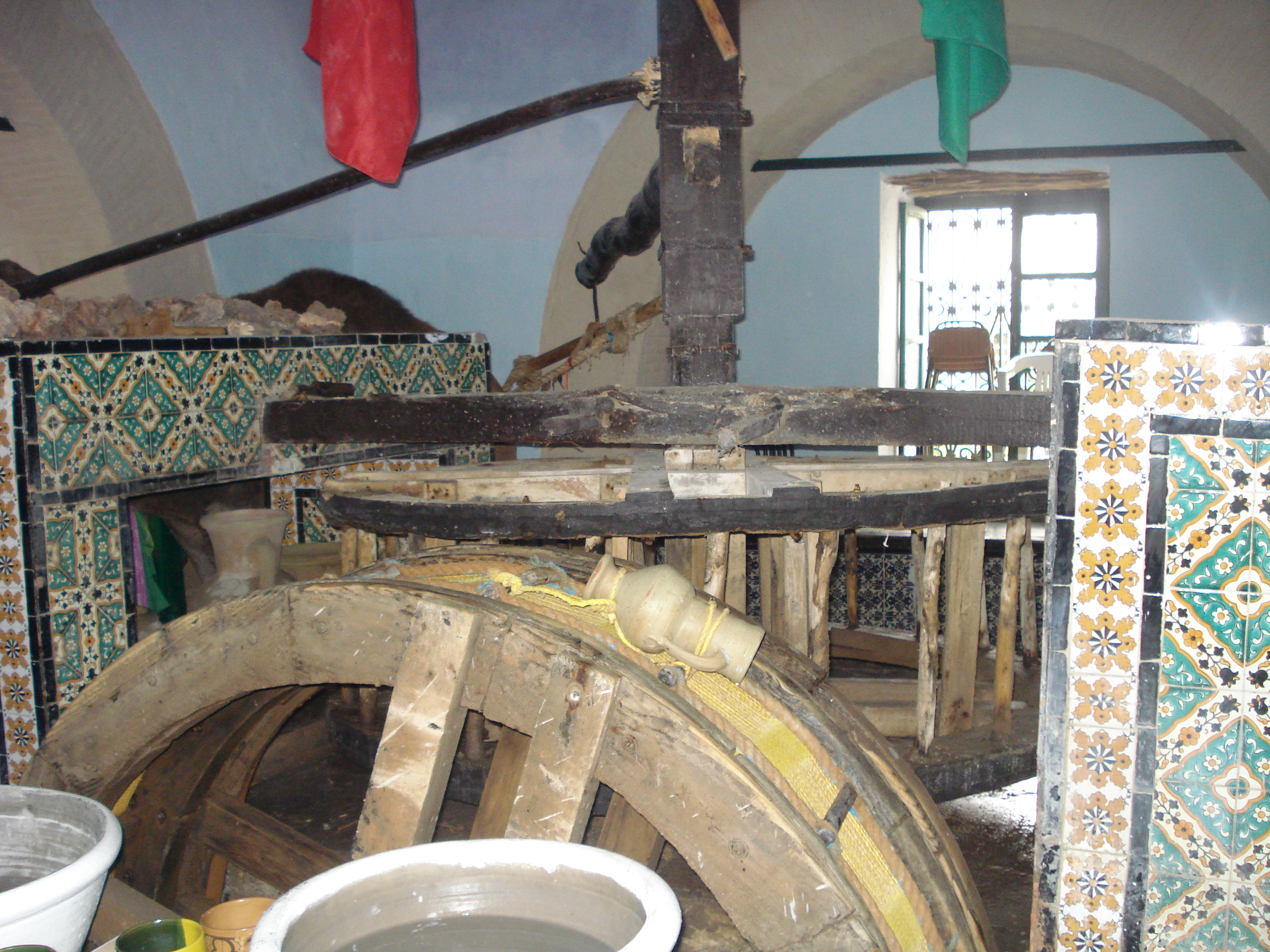 Puits de Bir Barrouta à Kairouan (Tunisie)